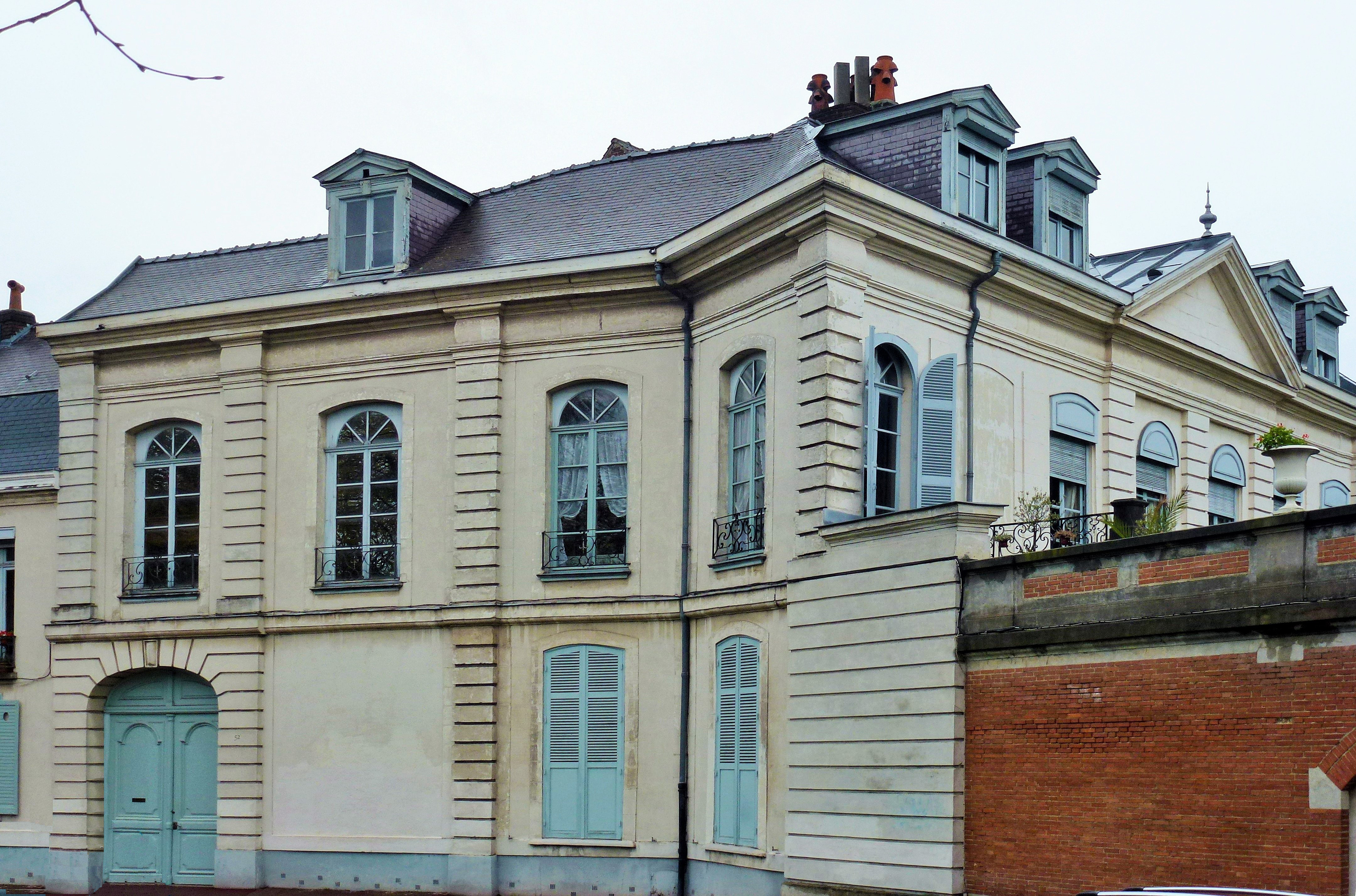 Hôtel du 52 façade de l'Esplanade à Lille Nord (département français) .